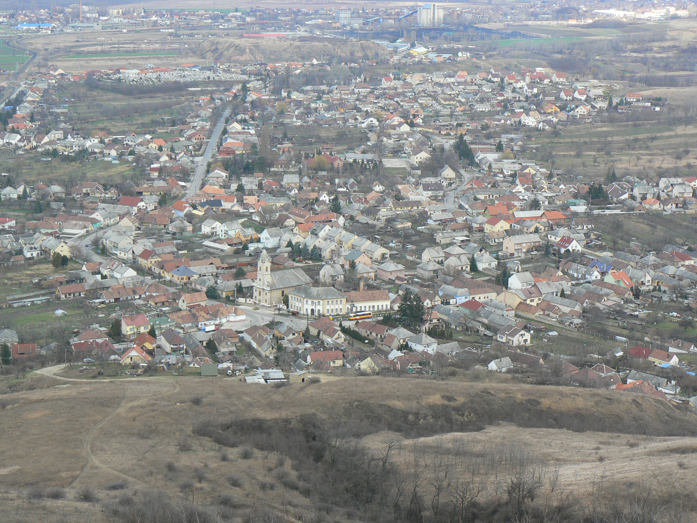 Tokod, Komárom-Esztergom megye